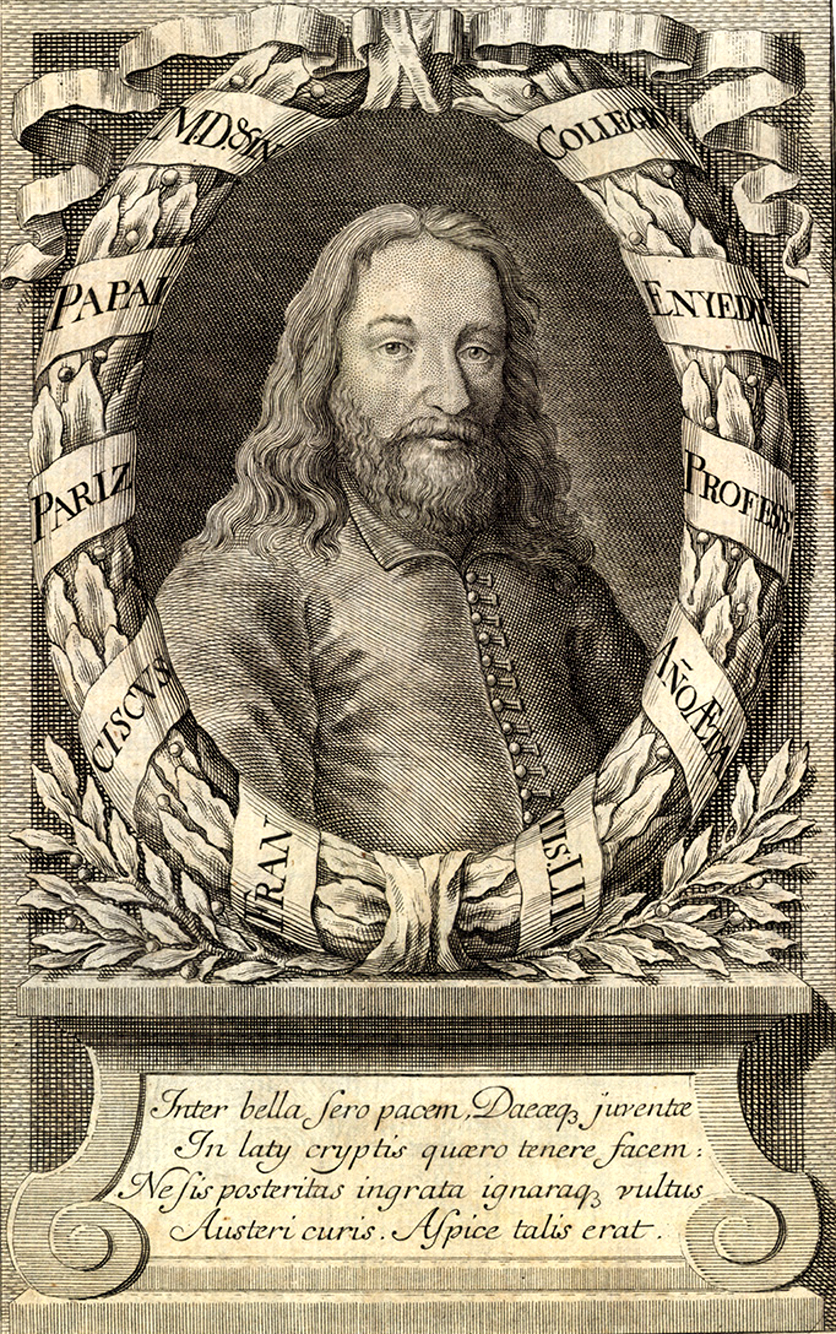 Pápai Páriz Ferenc (Dés, 1649. május 10. – Nagyenyed, 1716. szeptember 10.) tanár, az orvoslás és a filozófia doktora.